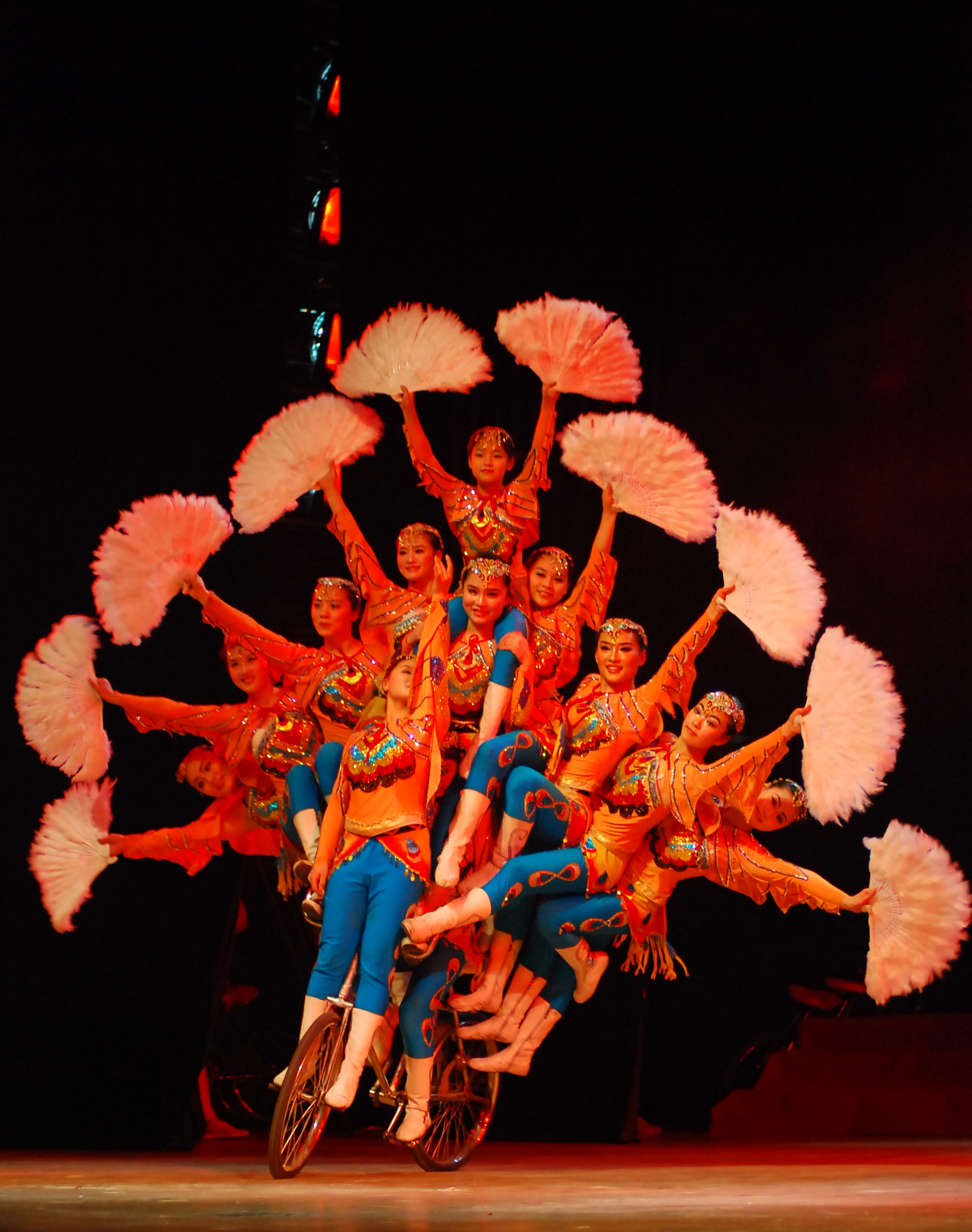 杂技自行车